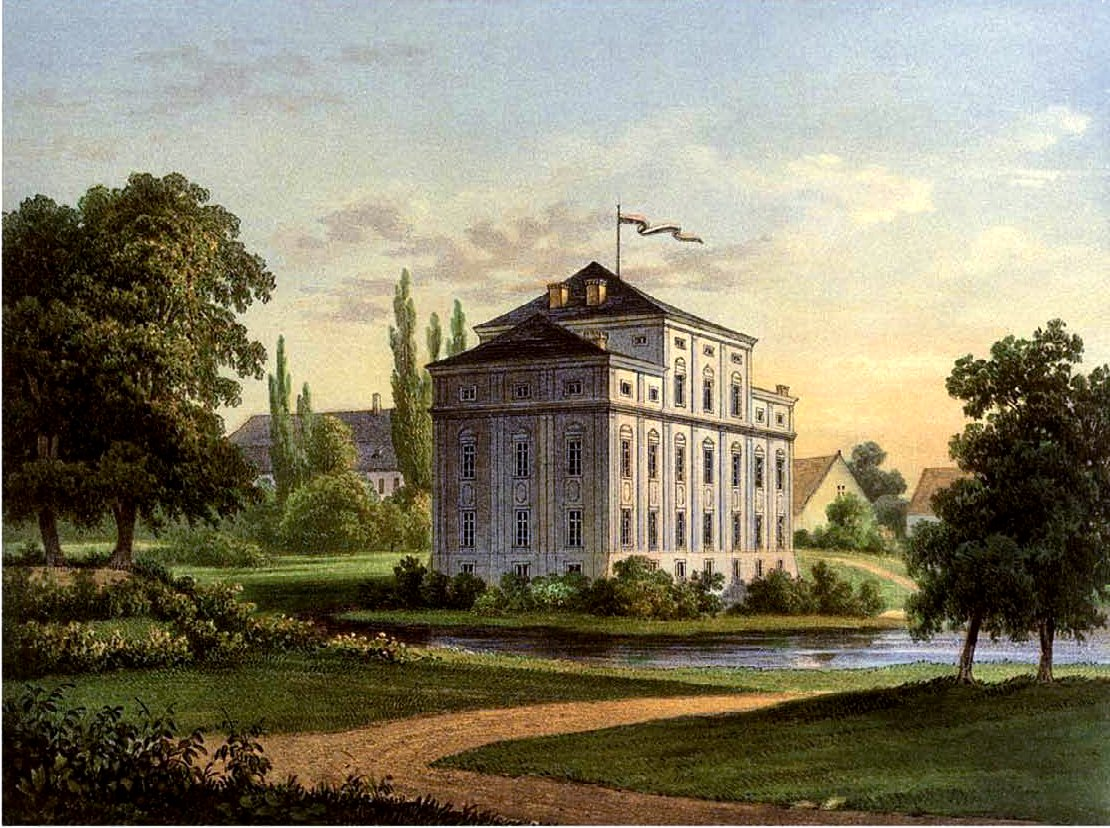 Schloss Silbitz, Kreis Nimptsch, Provinz Schlesien, Lithografie aus dem 19. Jahrhundert